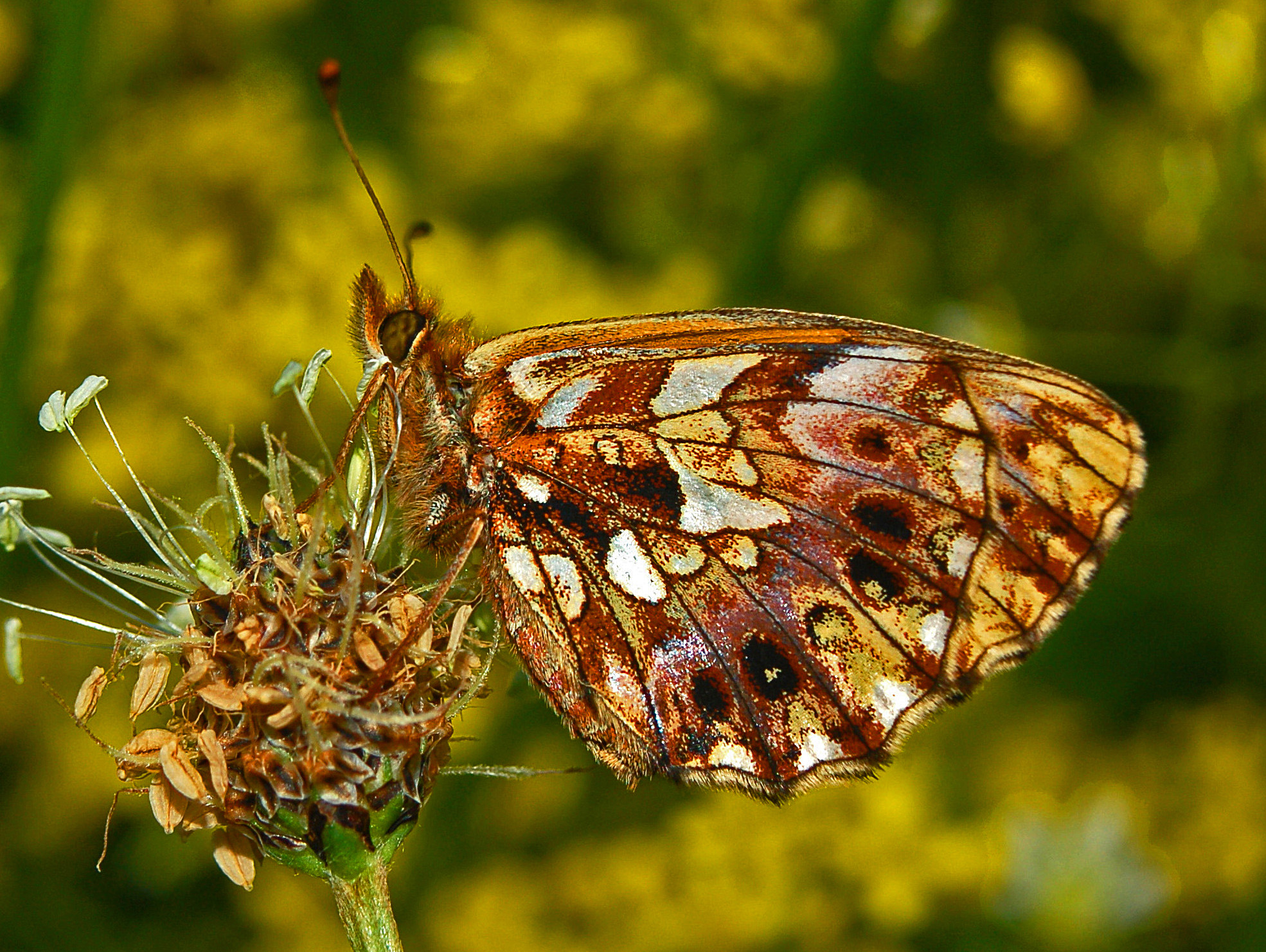 "Boloria dia". Piani di Praglia, Genova, Italy